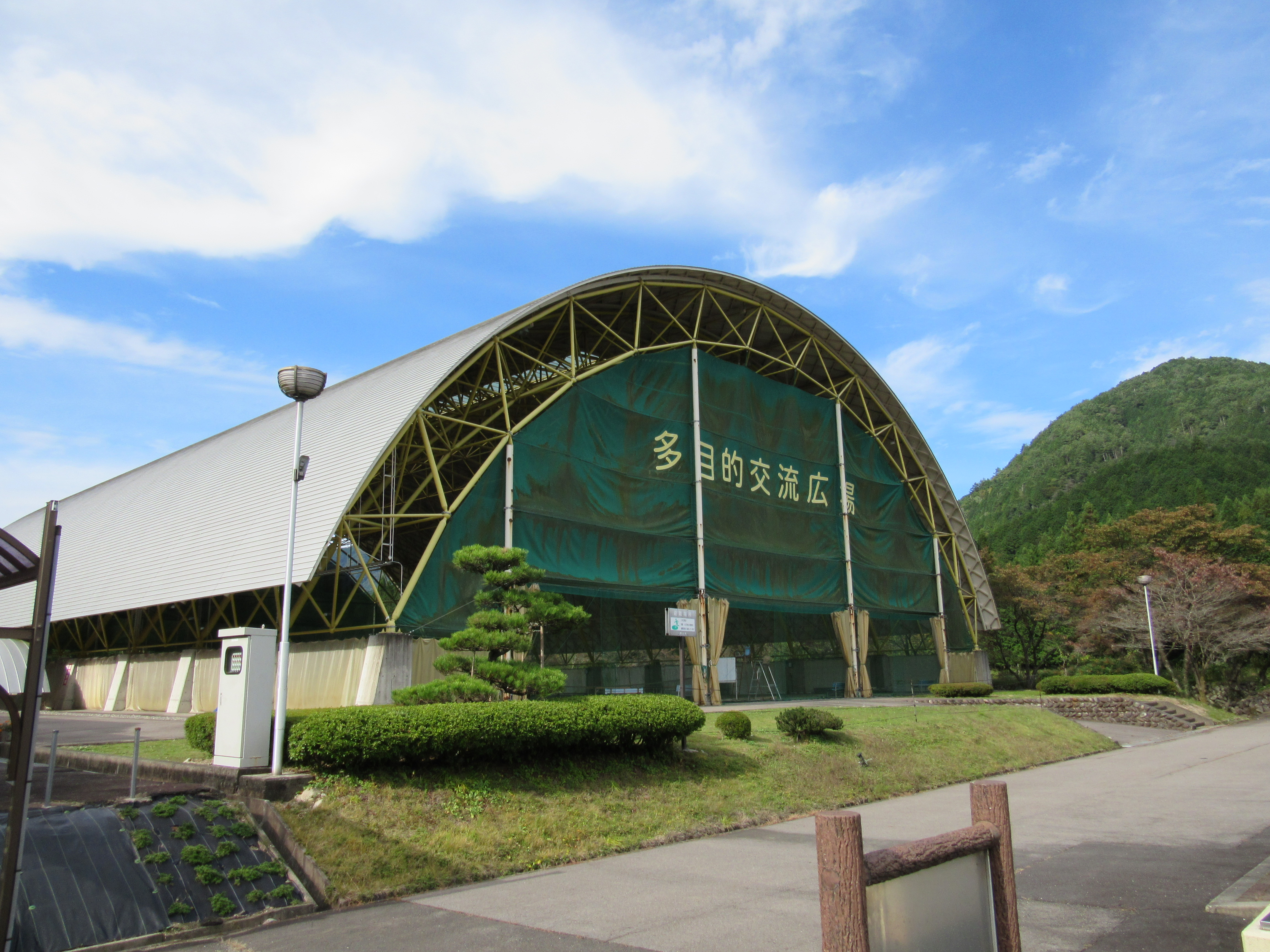 和良運動公園